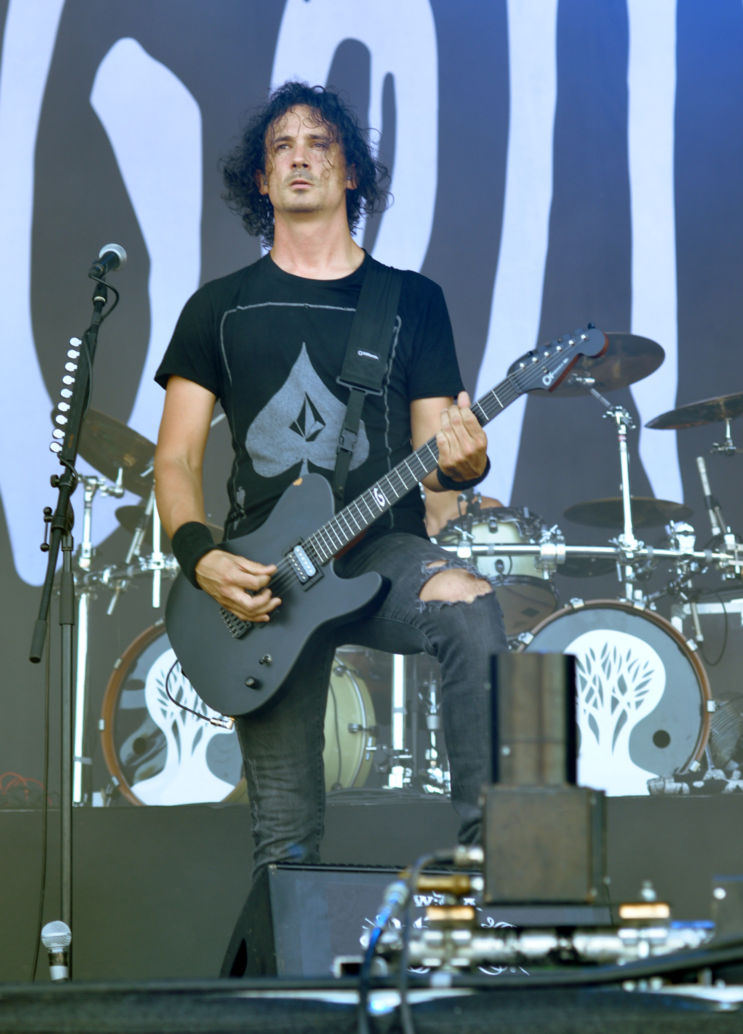 Gojira at Wacken Open Air 2013